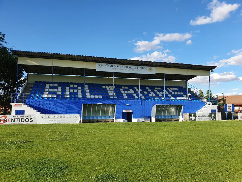 Campo de fútbol Municipal Ceferino Atienza (Baltanás)